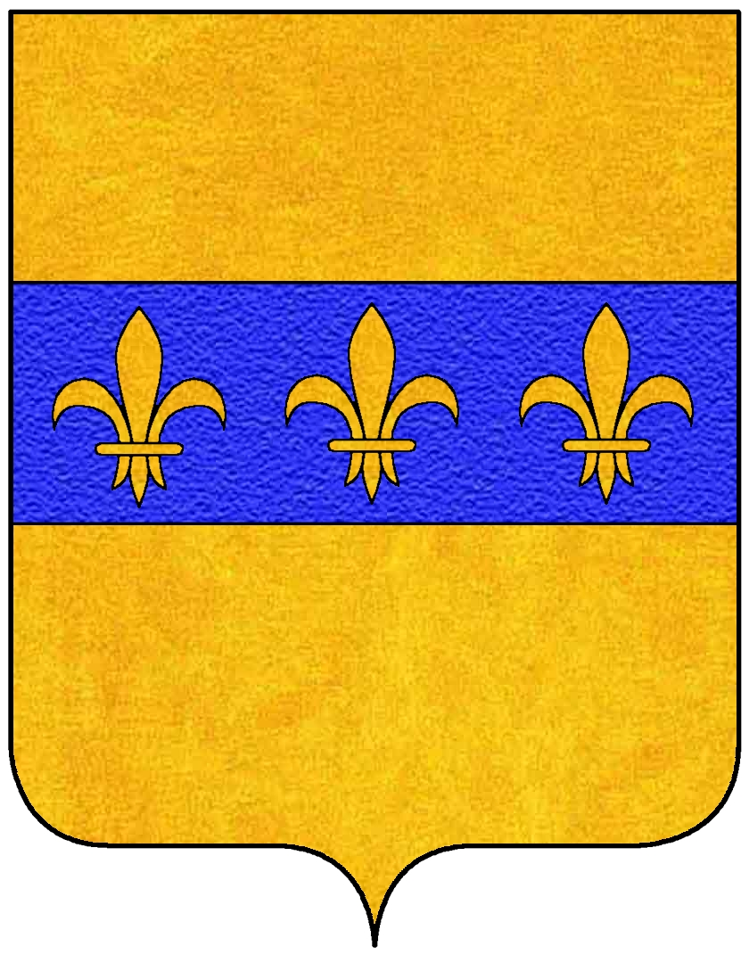 Stemma della famiglia Querini, appartenente al patriziato di Venezia.